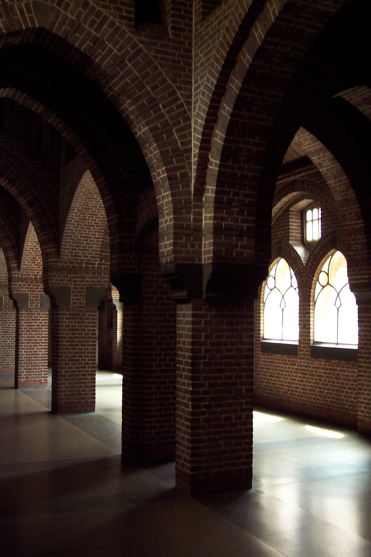 Centraal op het terrein bevindt zich het hoofdgebouw van het BENEDICTIJNERKLOOSTER. Het klooster werd voornamelijk opgetrokken in een drietal bouwfasen, te weten 1906, 1908-1910 en 1919-1920.